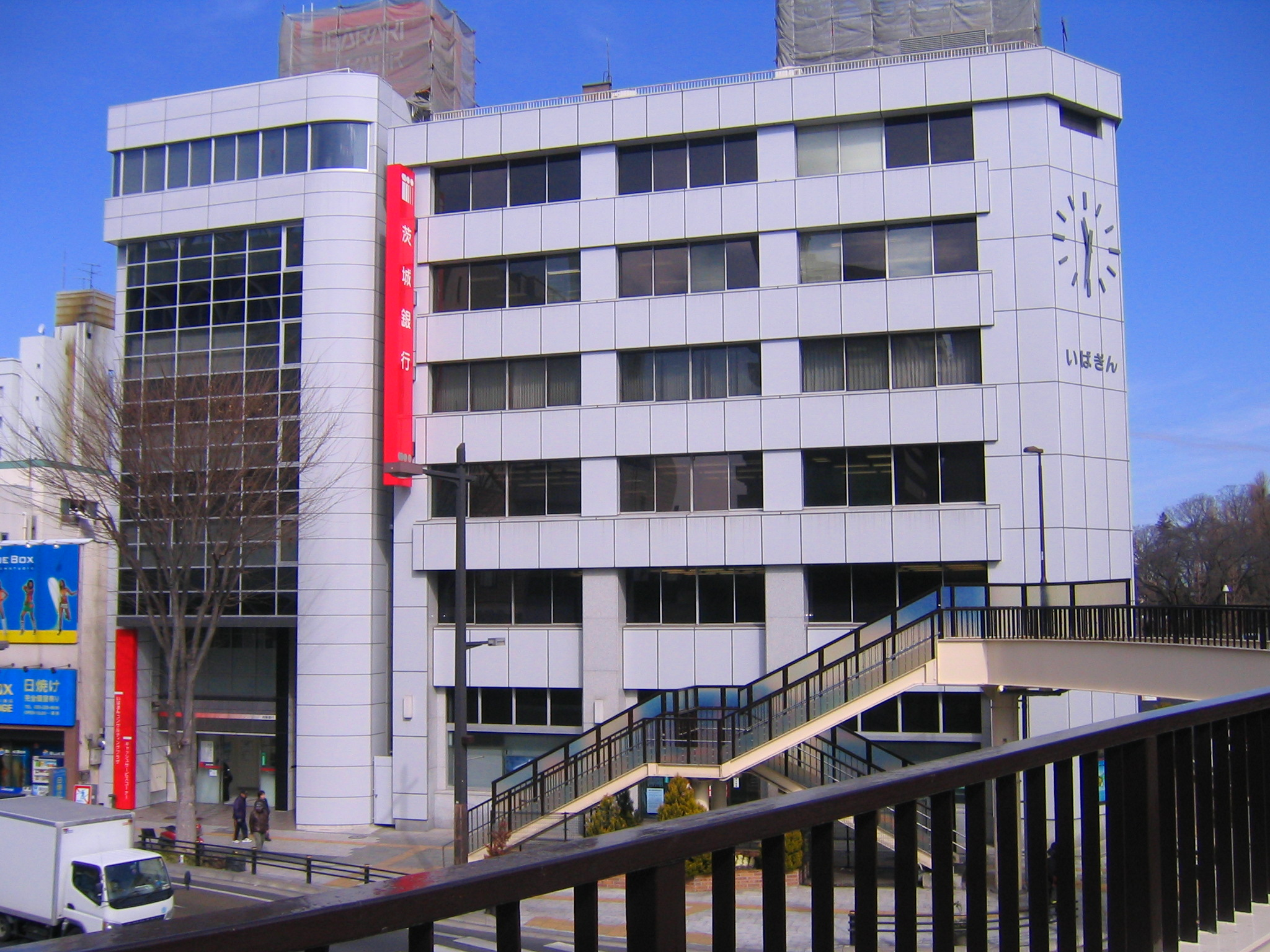 茨城銀行本店